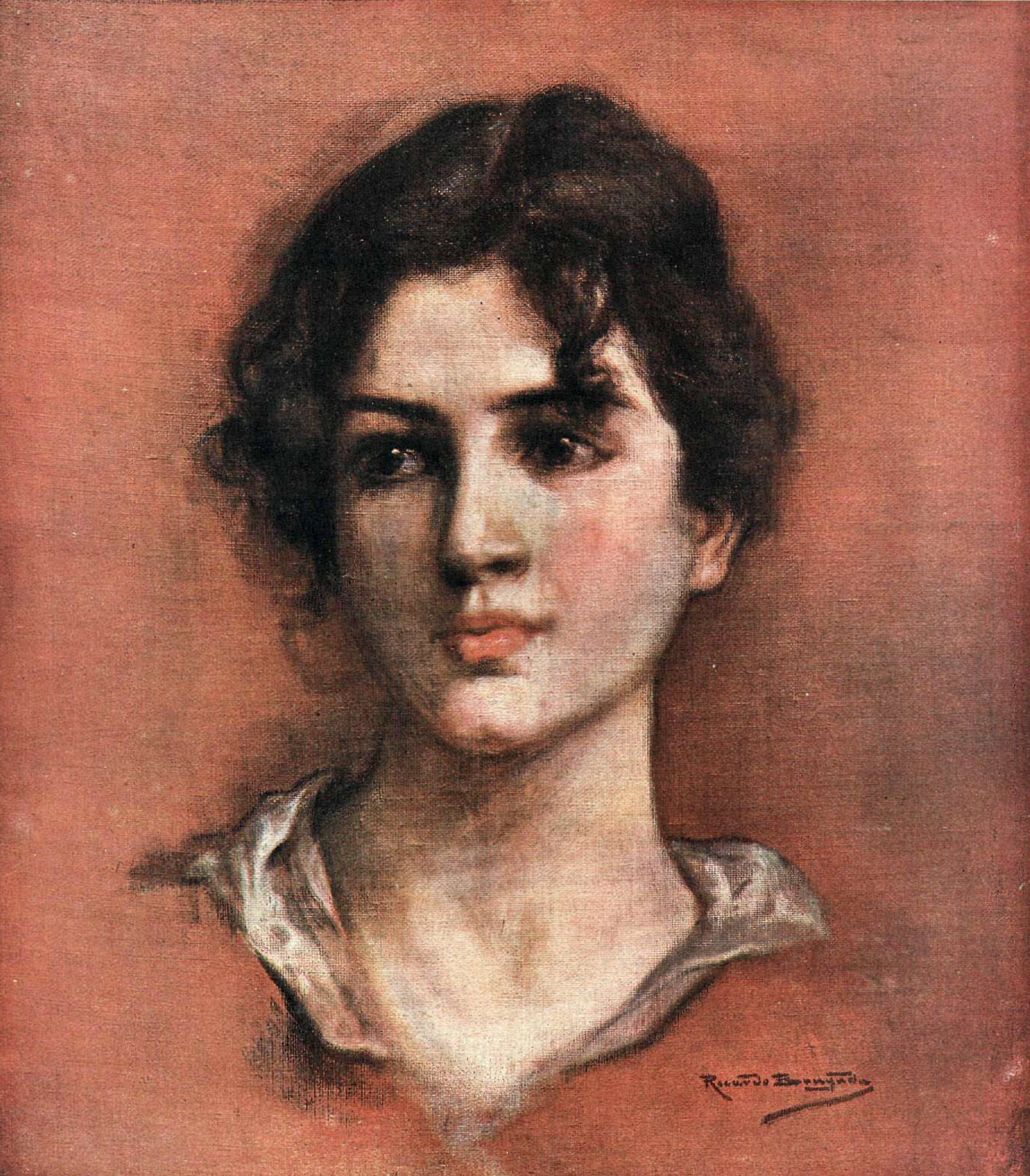 Serenidad.